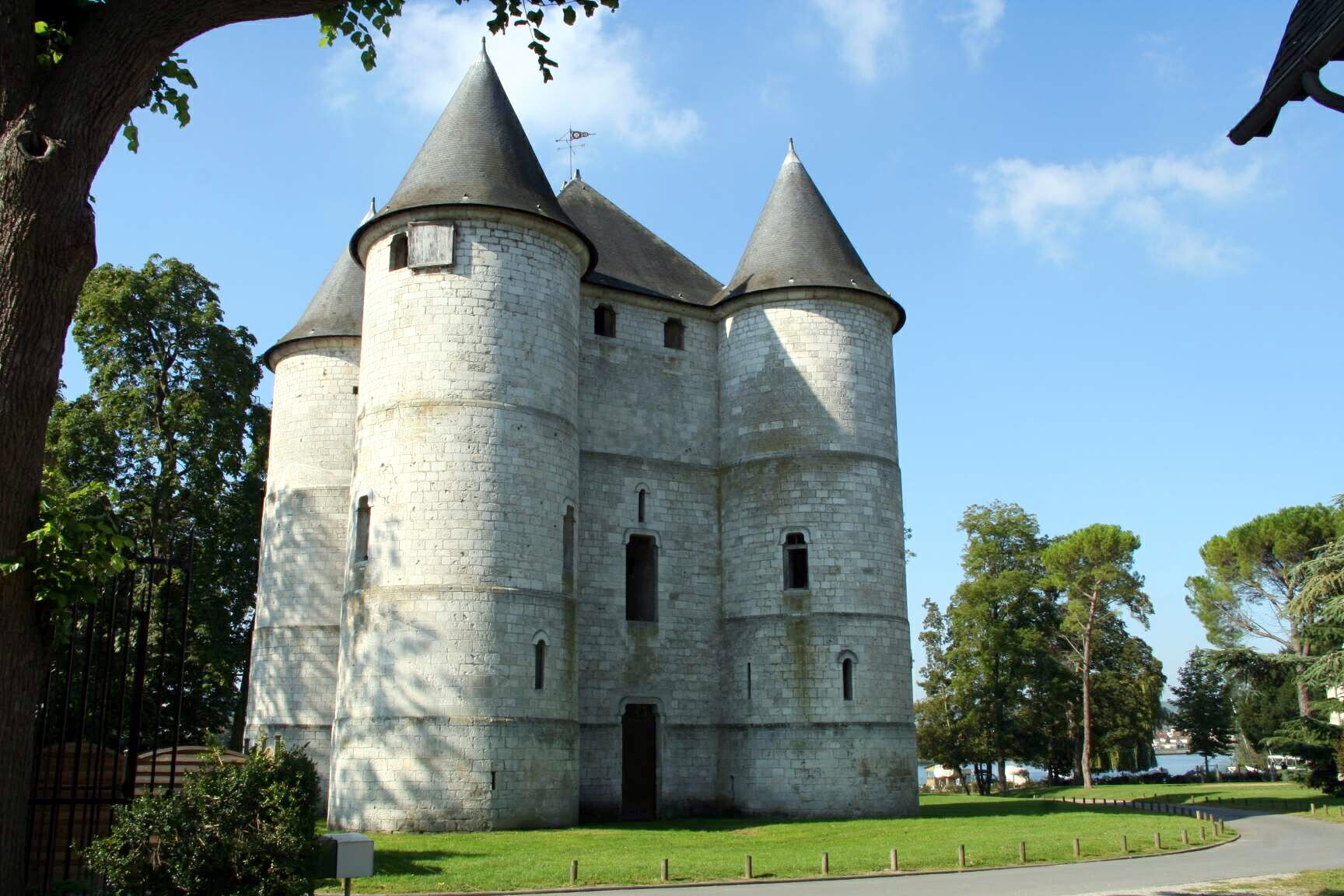 Le château des Tourelles à Vernon - Eure (France)